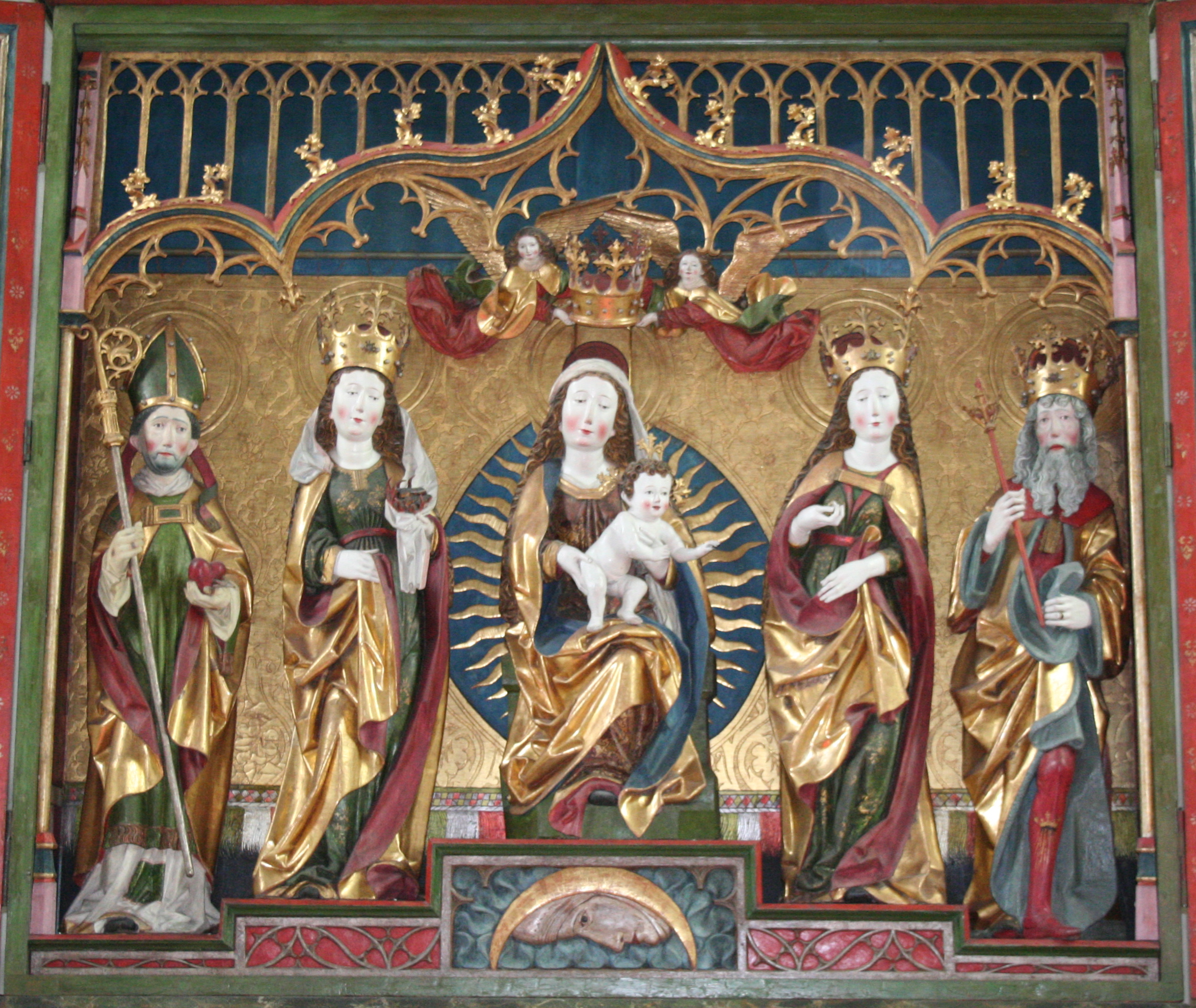 Kirche St. Maria und Michael in Churwalden, Altarblatt des Hochaltars